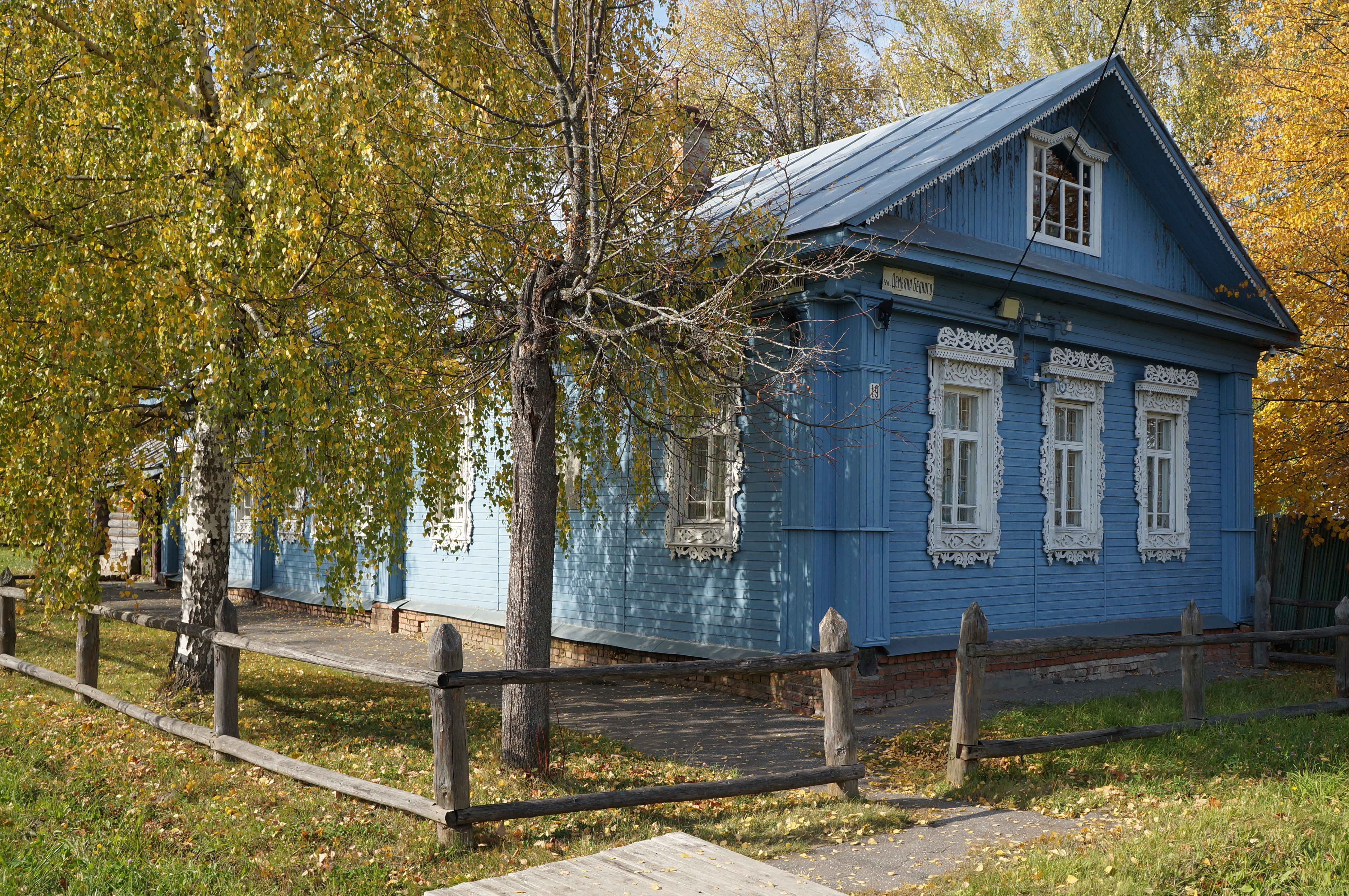 Дом, в котором в 1892г. родился, провел свое детство и до 1967г. периодически жил, работал и отдыхал художник П.Д. Корин: улица Демьяна Бедного, 19, Палех, Палехский район, Ивановская область